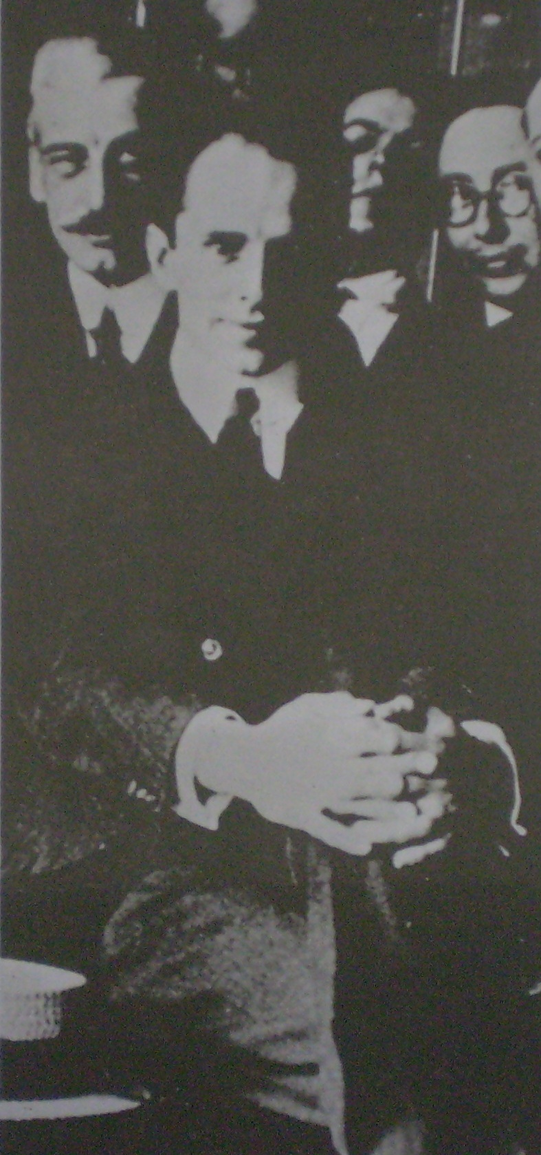 Federico Pinedo